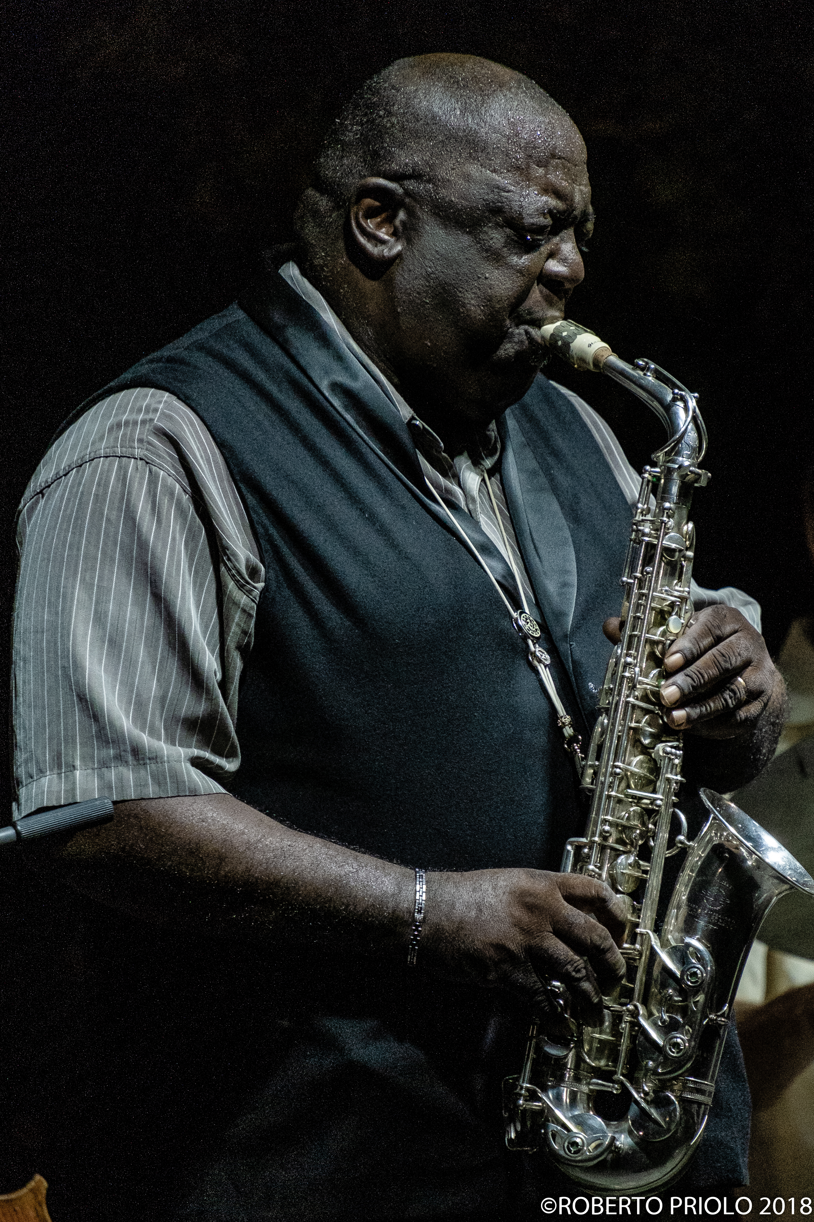 Jesse Davis